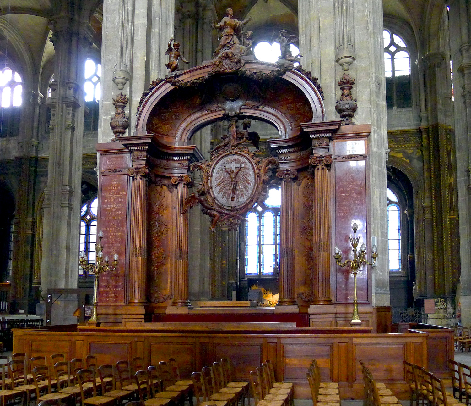 Eglise Saint-Eustache (banc d'oeuvre, c.1720) - Paris IerBanc d'oeuvre exécuté par Pierre Lepautre d'après les dessins de Sylvain Cartaud ; au faîte du banc, le triomphe de sainte Agnès.